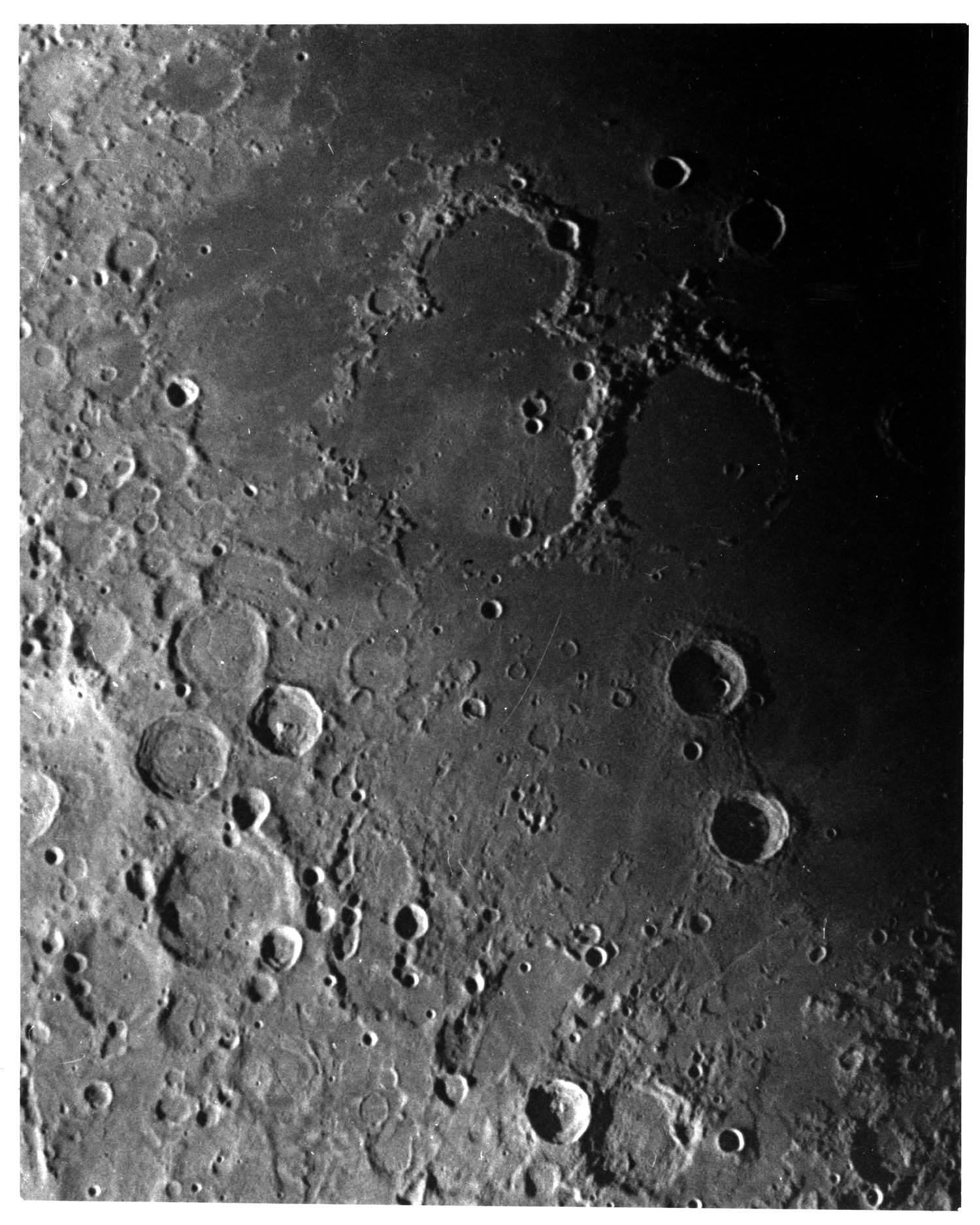 罗素-斯特鲁维-爱丁顿环形山照片